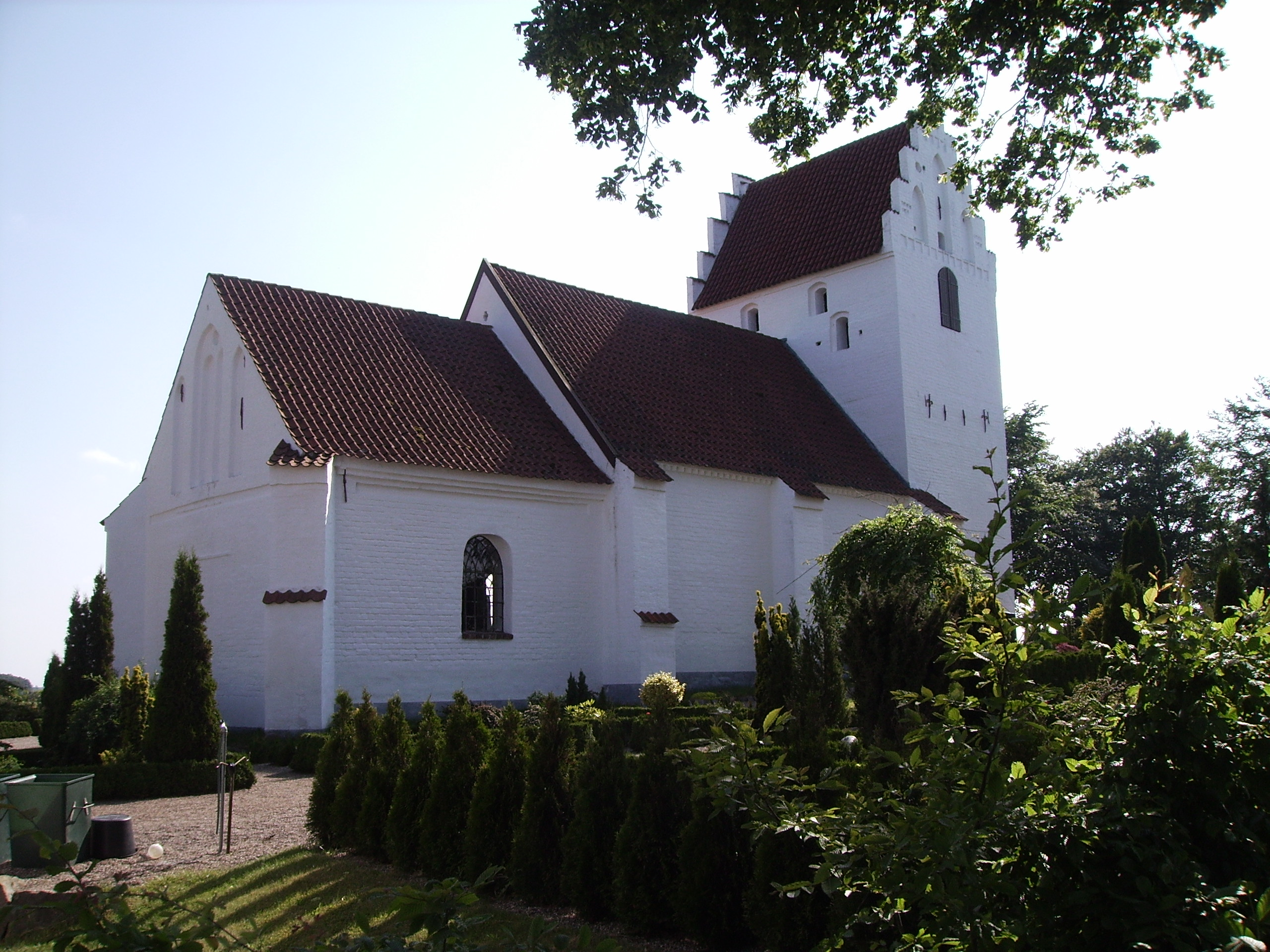 Bellinge Kirke, Bellinge Sogn, Odense Herred, Odense Amt, Denmark (Danish Church)